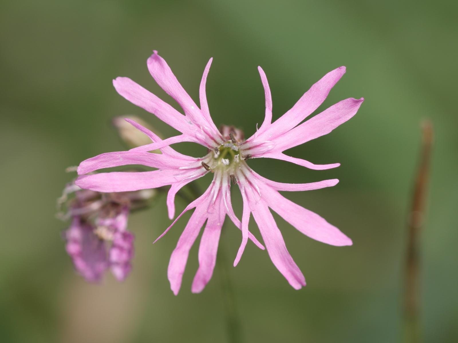 Kuckuckslichtnelke, Kristian Peters 6.7.2004, Warnow-Wiesen